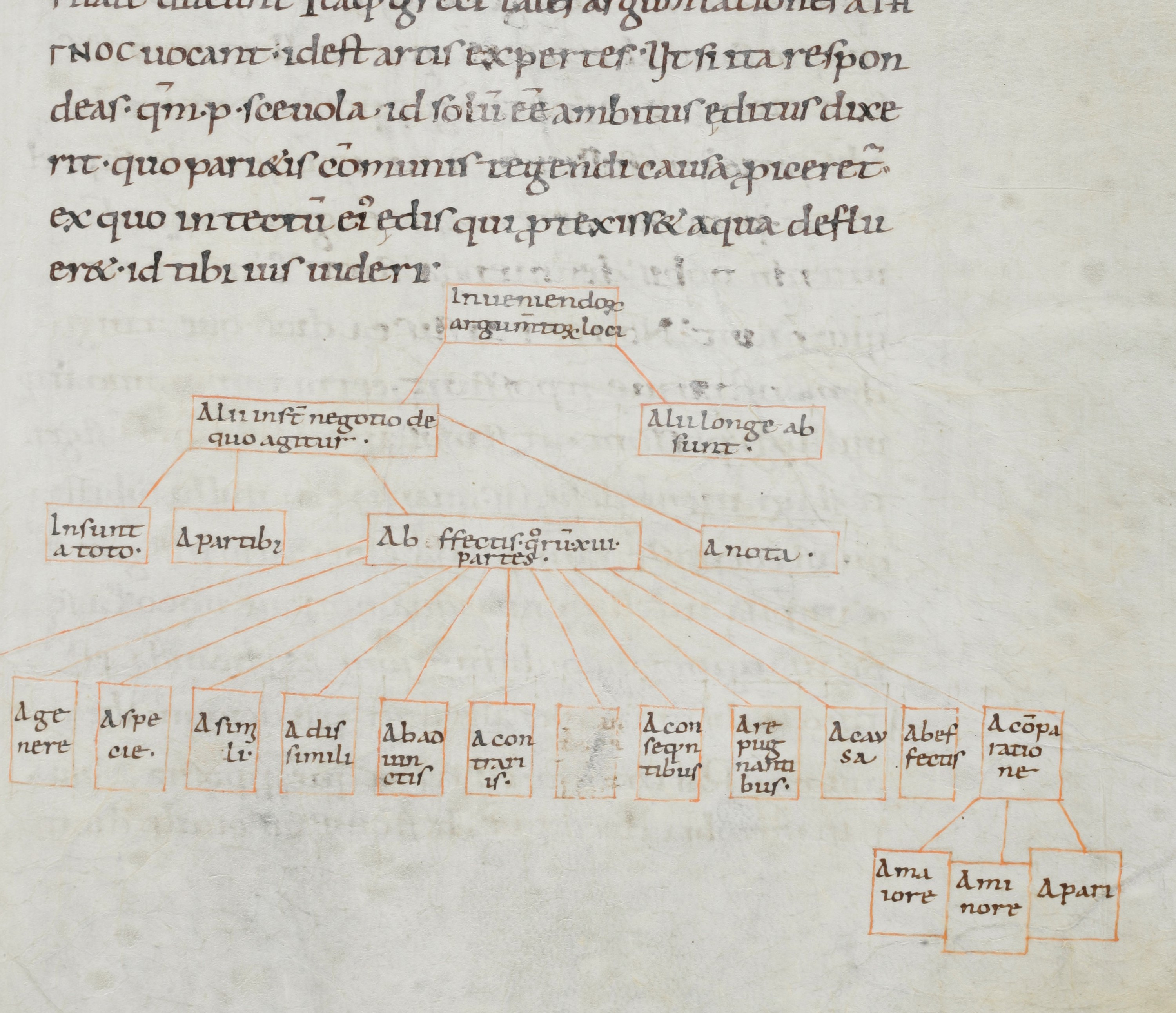 Fragment XI-wiecznego rękopisu Topiki Cycerona z rysunkiem przedstawiającym podstawową klasyfikację toposów.